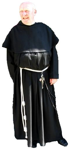 Bewerking van de al op Wiki gebruikte foto (te vinden als "Afbeelding:Pater Pax.jpg",) met GFDL Licentie, geplaatst door Paul Hermans. Daar stonden veel andere zaken als bloemen op en dat leidt af.